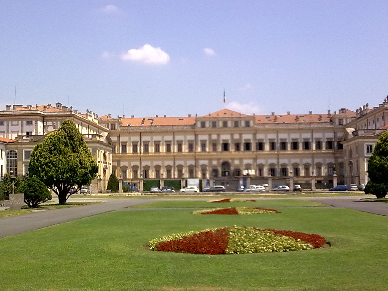 Villa Reale This is a photo of a monument which is part of cultural heritage of Italy.